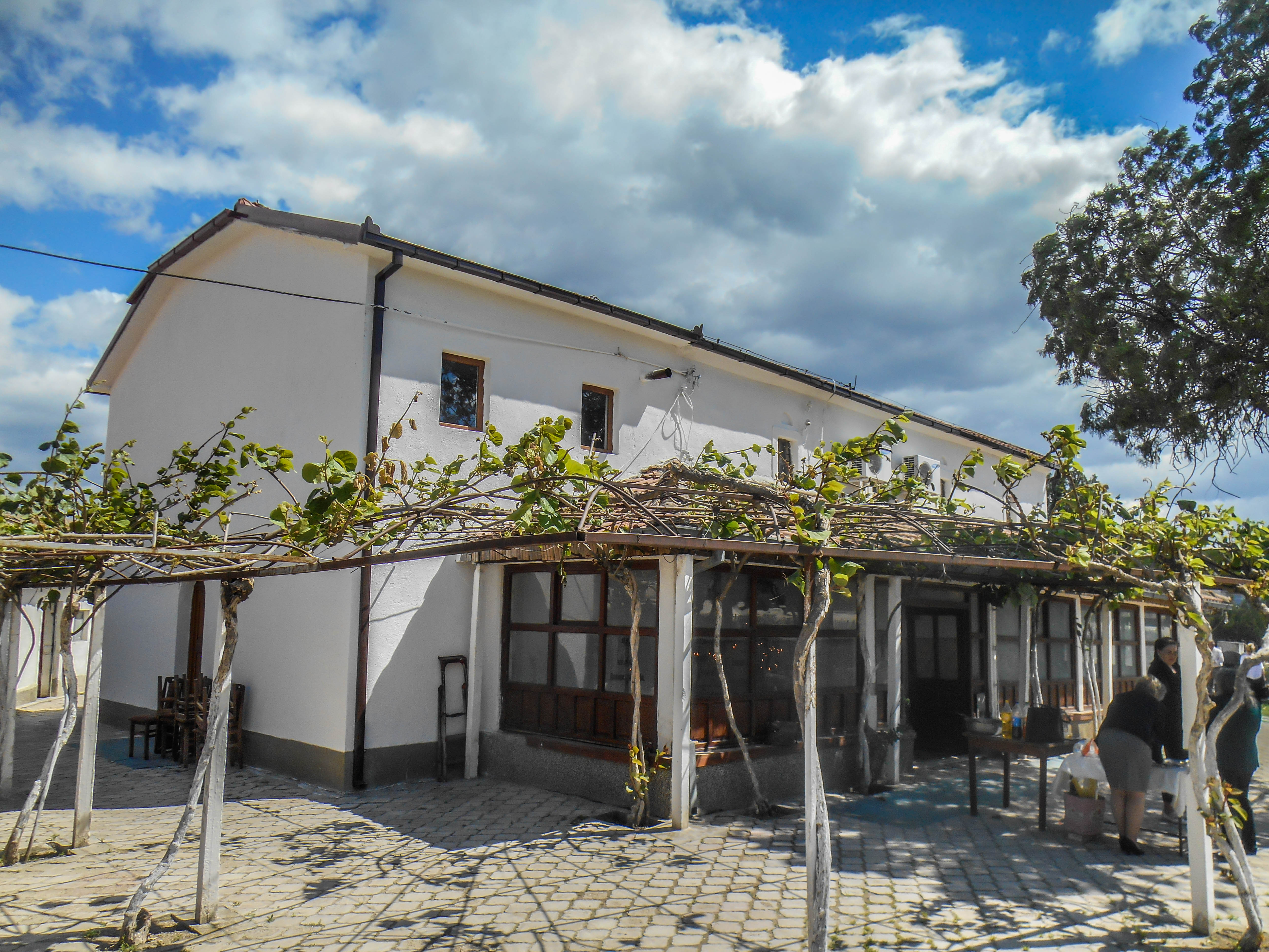 Црква „Св. Ѓорѓи“ - Пиперево